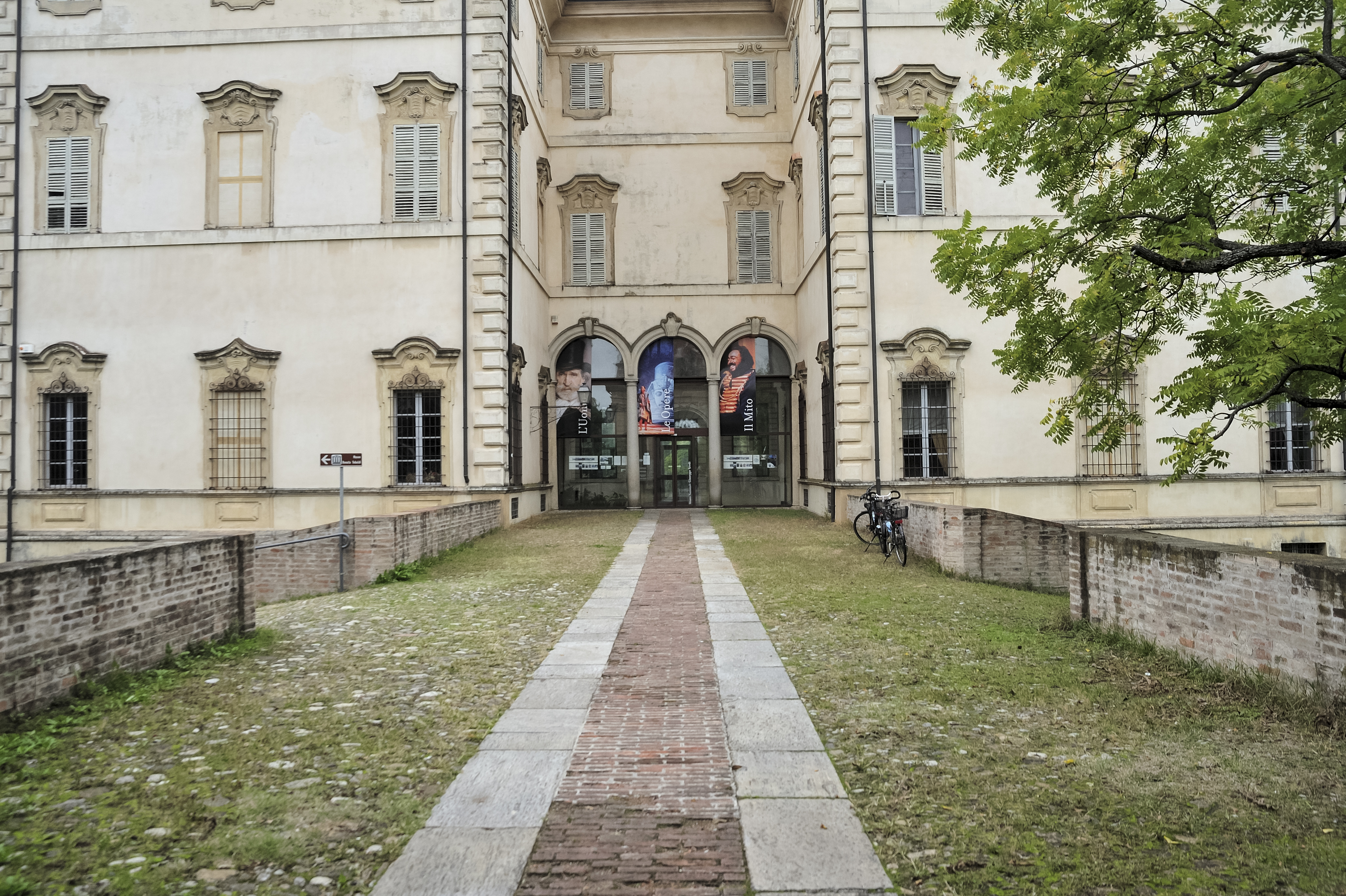 villa Pallavicino This is a photo of a monument which is part of cultural heritage of Italy.